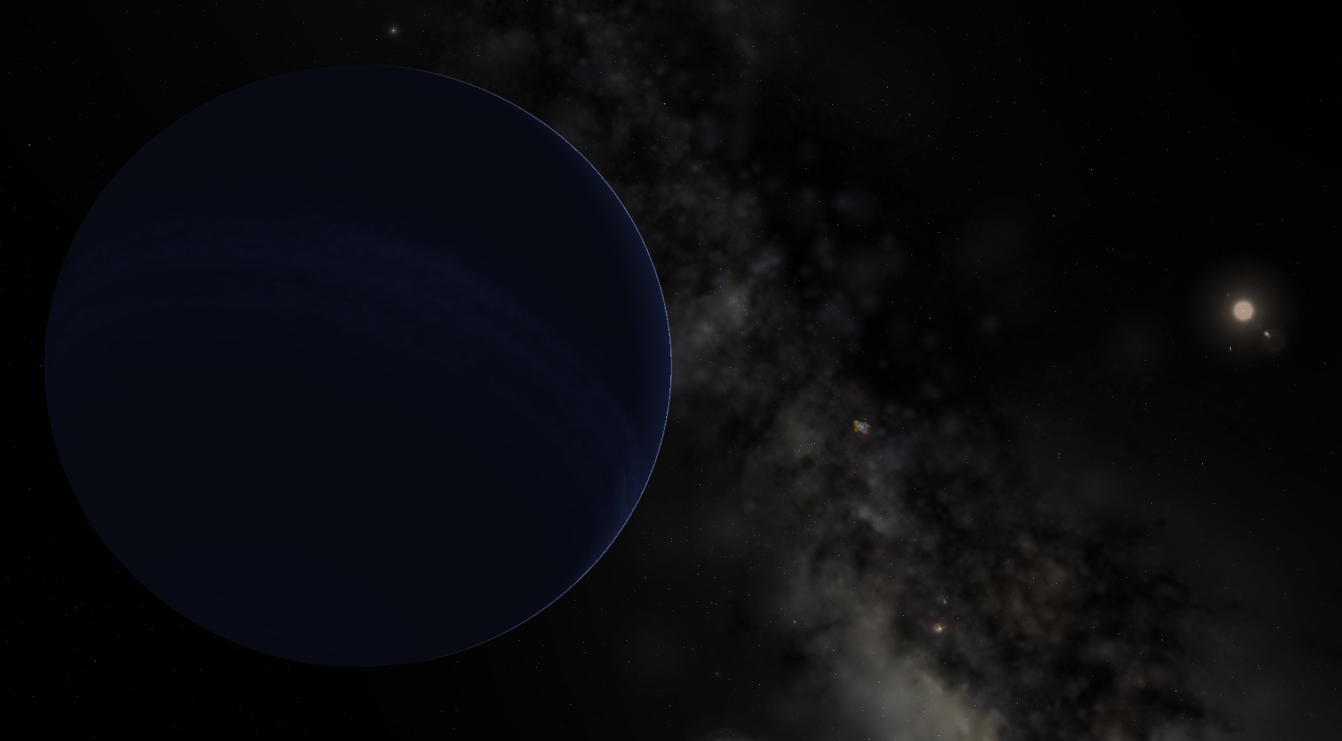 Гипотетическая "Девятая планета", смоделированная в программе Celestia.